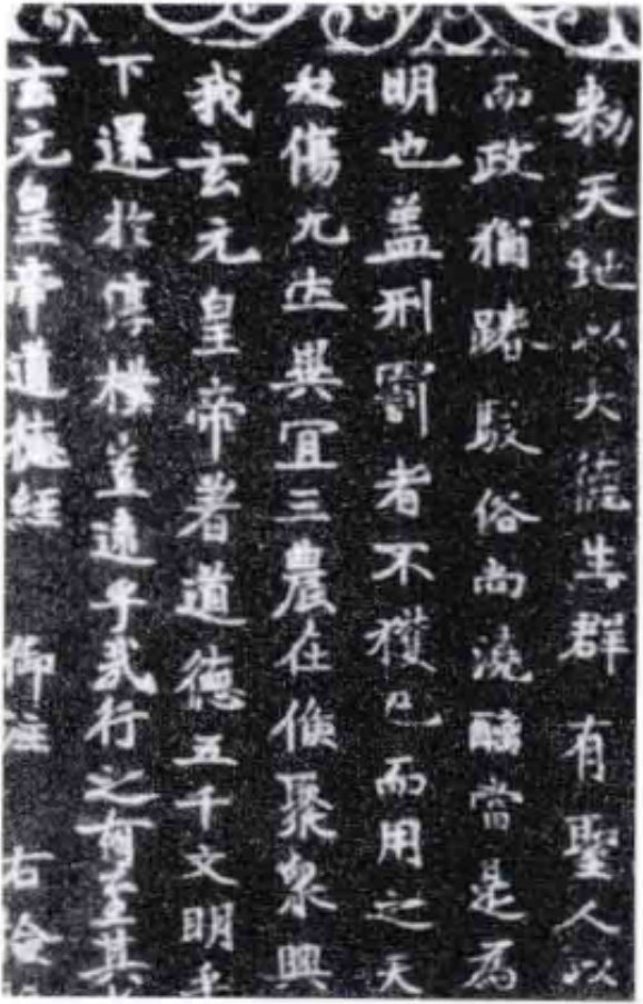 邢台道德经幢拓片